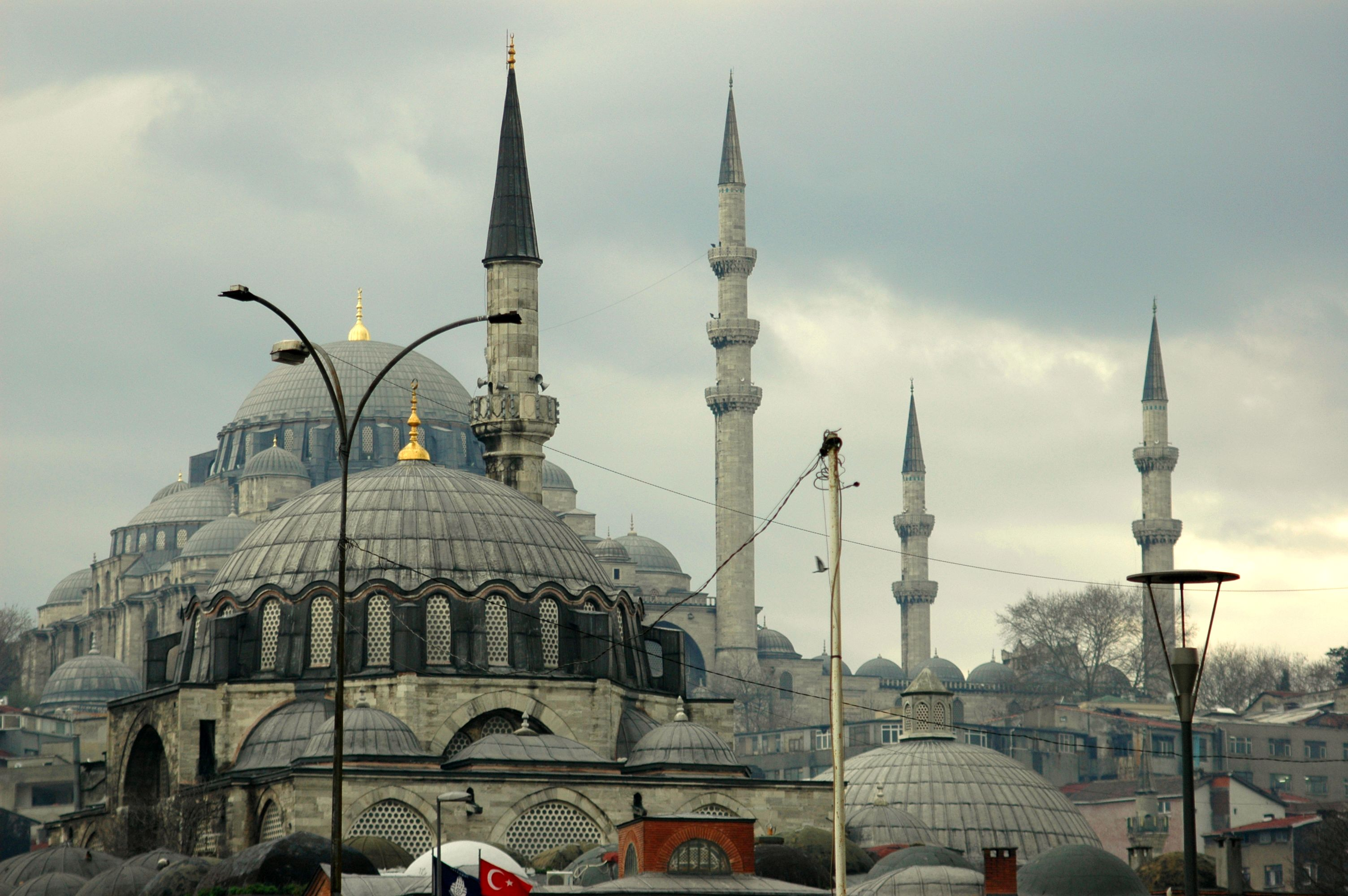 Istanbul - Rüstem Paşa - Exterior